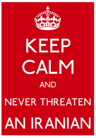 هرگز یک ایرانی را تهدید نکن